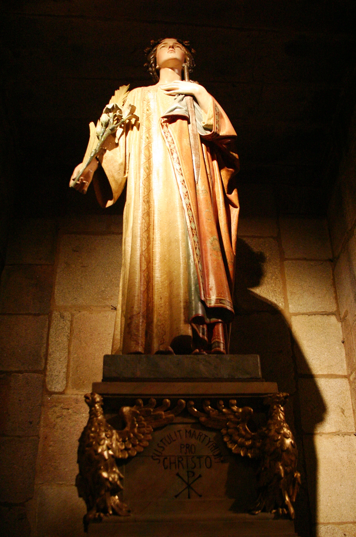 Santa Susana